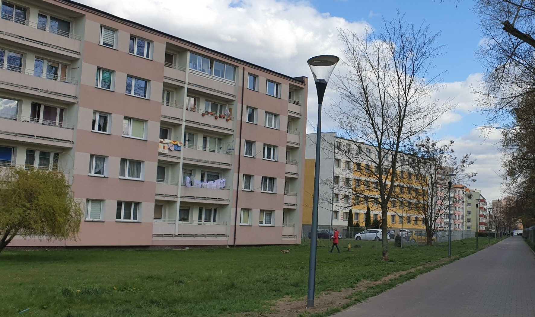 Osiedle Hallera. Droga dla pieszych i rowerzystów